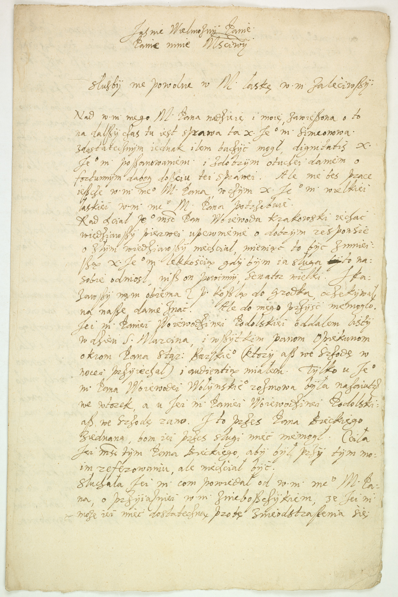 List NN, sługi Andrzeja Tęczyńskiego, wojewody krakowskiego, zawierający relację z rozmów, jakie autor listu przeprowadził z Elżbietą Mielecką, wdową po Mikołaju, wojewodzie podolskim i hetmanie wielkim koronnym, a których celem miało być uzyskanie zgody na ślub księcia Słuckiego Jana Szymona Olelkowicza z córką Elżbiety, Zofią. Napisany w Gródku kilka dni przed 11 listopada 1585 r.